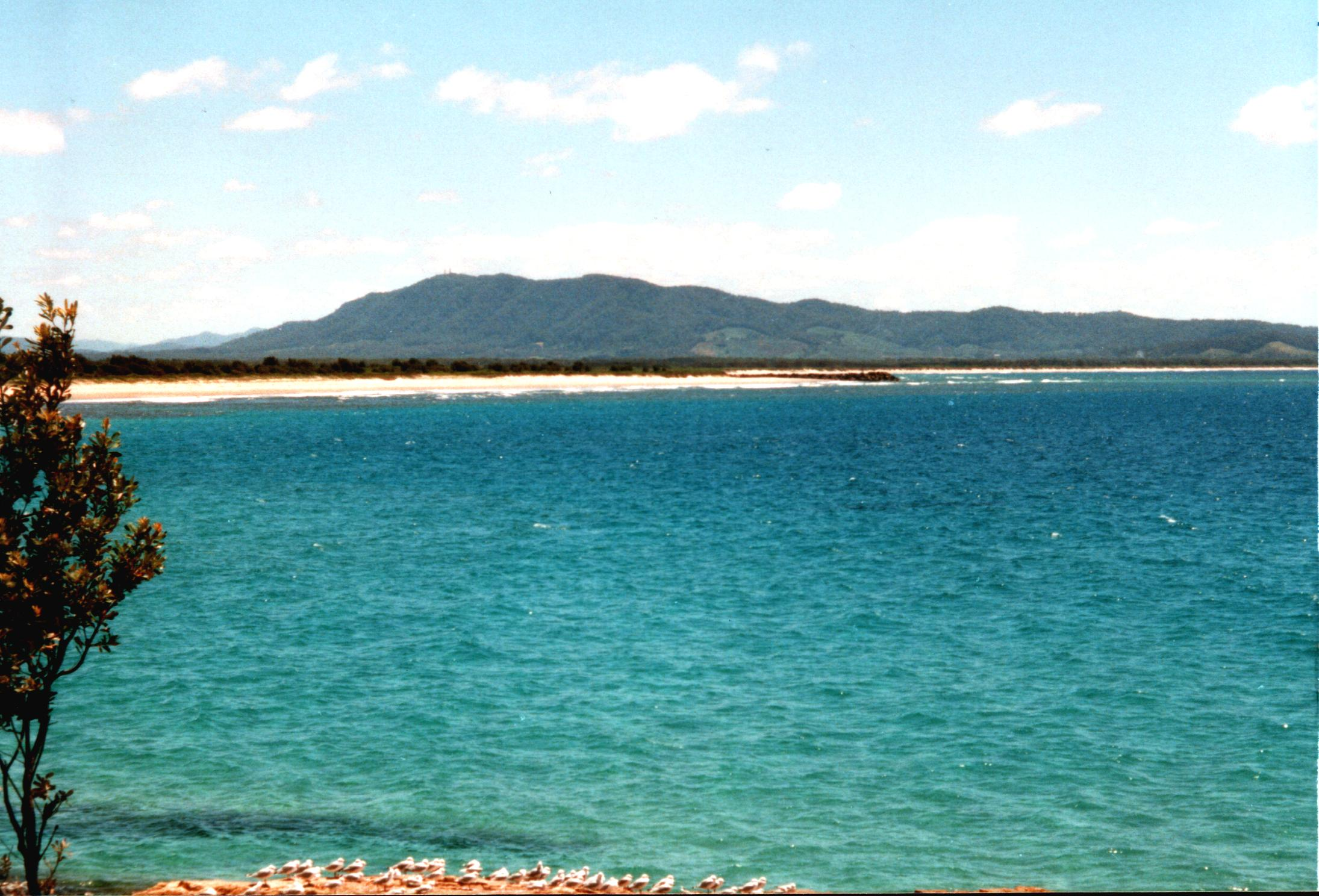 Trial Bay, NSW